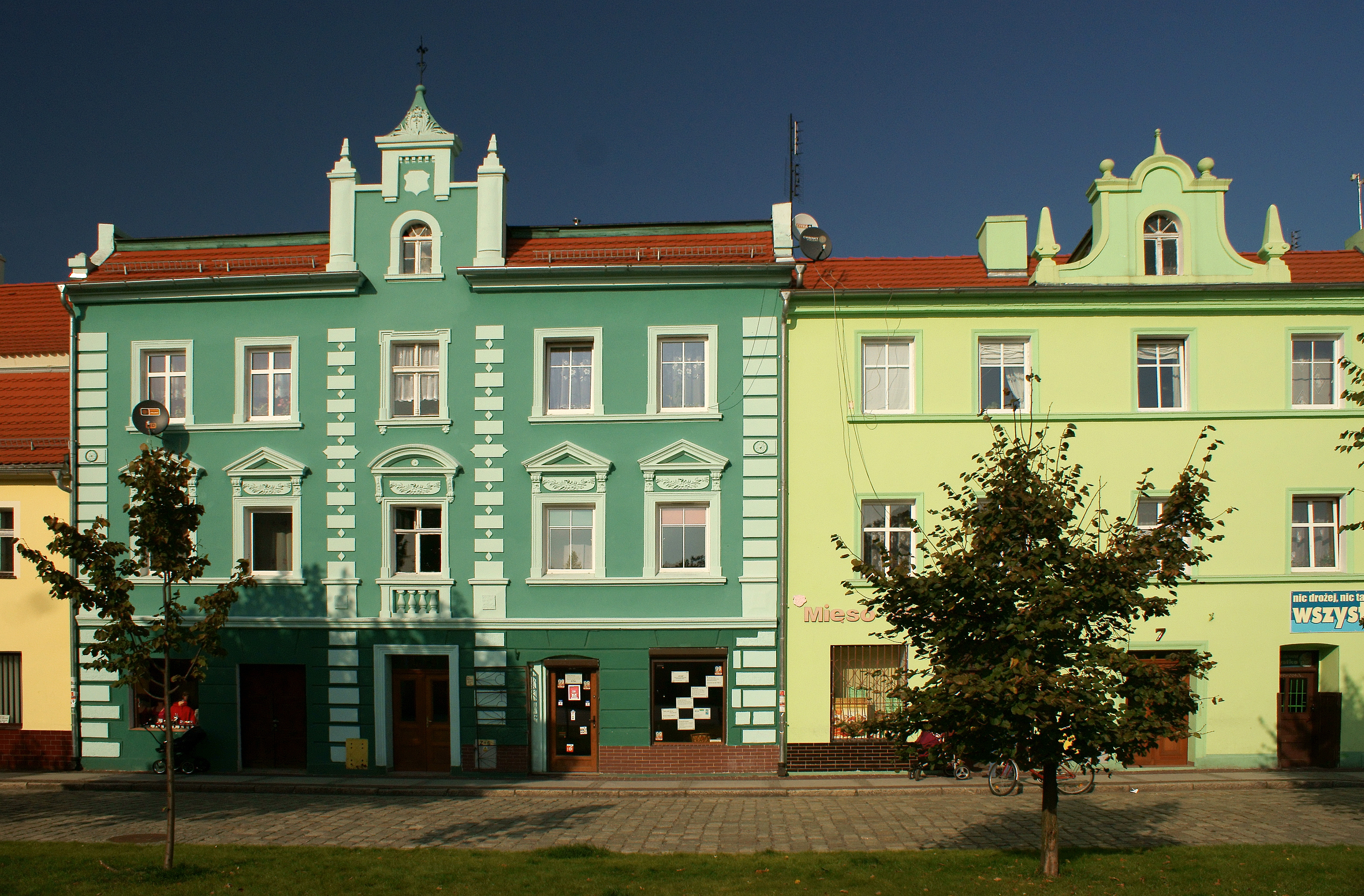 Miasto Chocianów, Chocianów